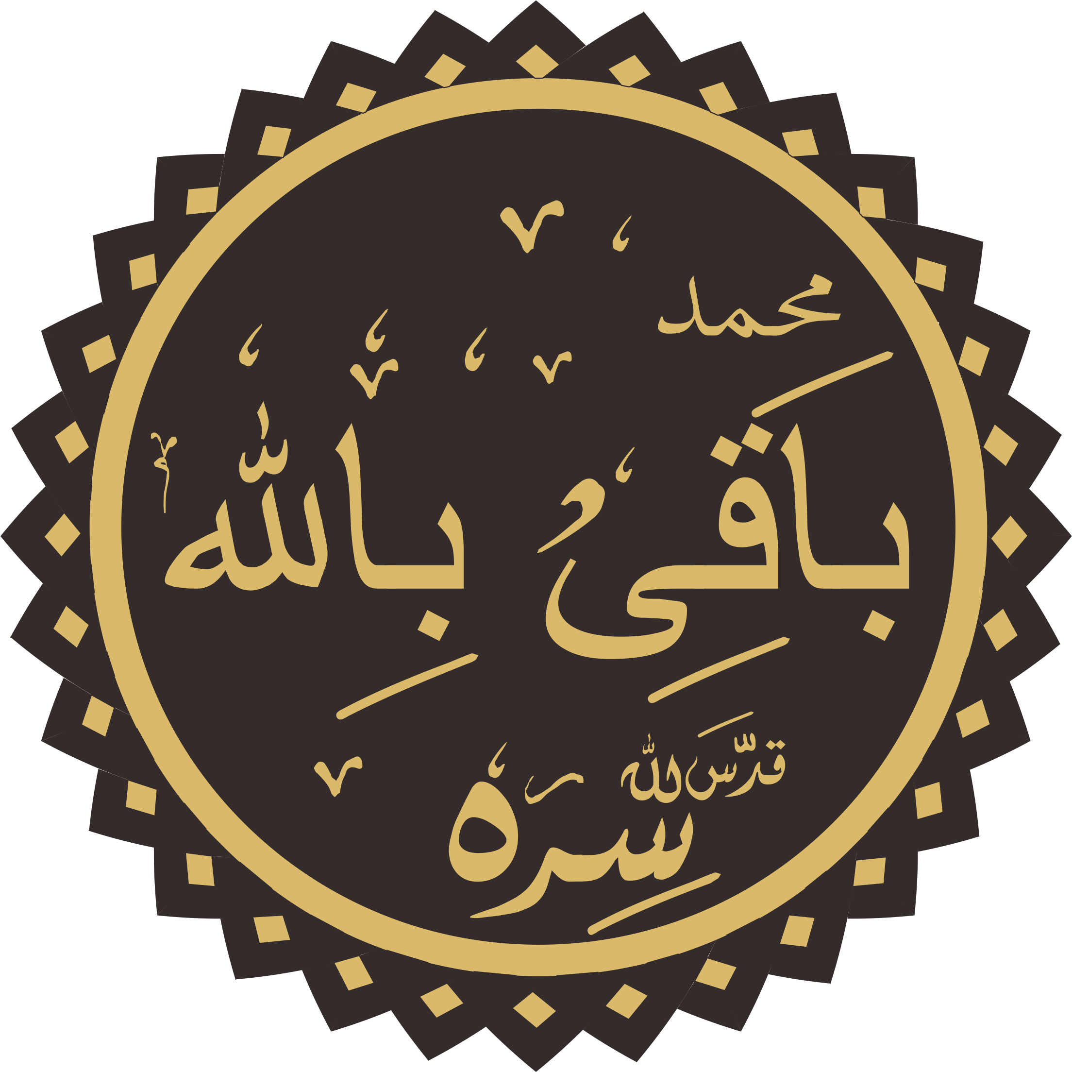 syekh baqi delhi